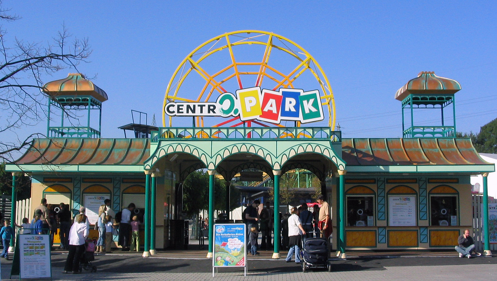 CentrO.PARK Entrance